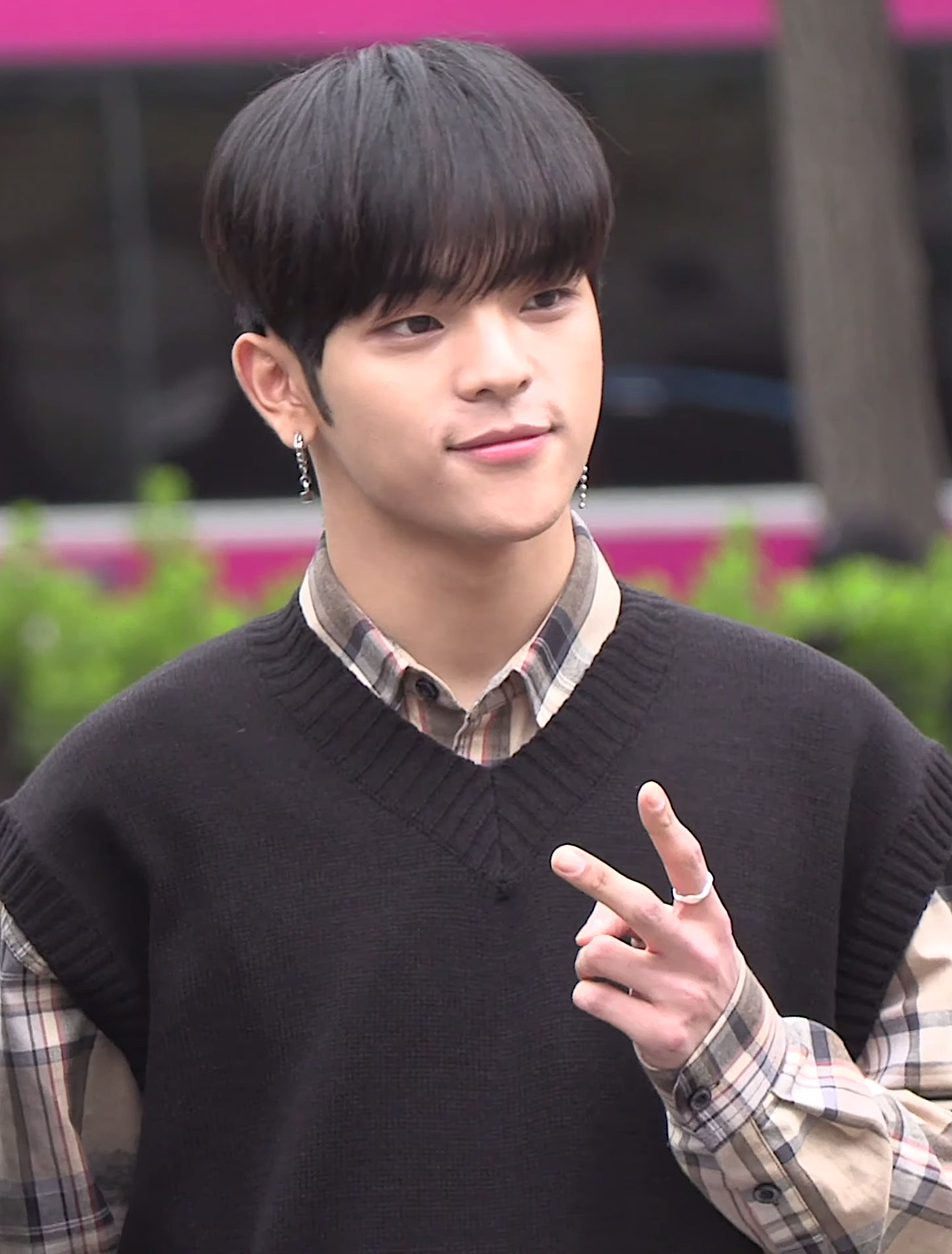 Stray Kids 宇珍於2019年4月19日在KBS音樂銀行上班路的媒體拍攝